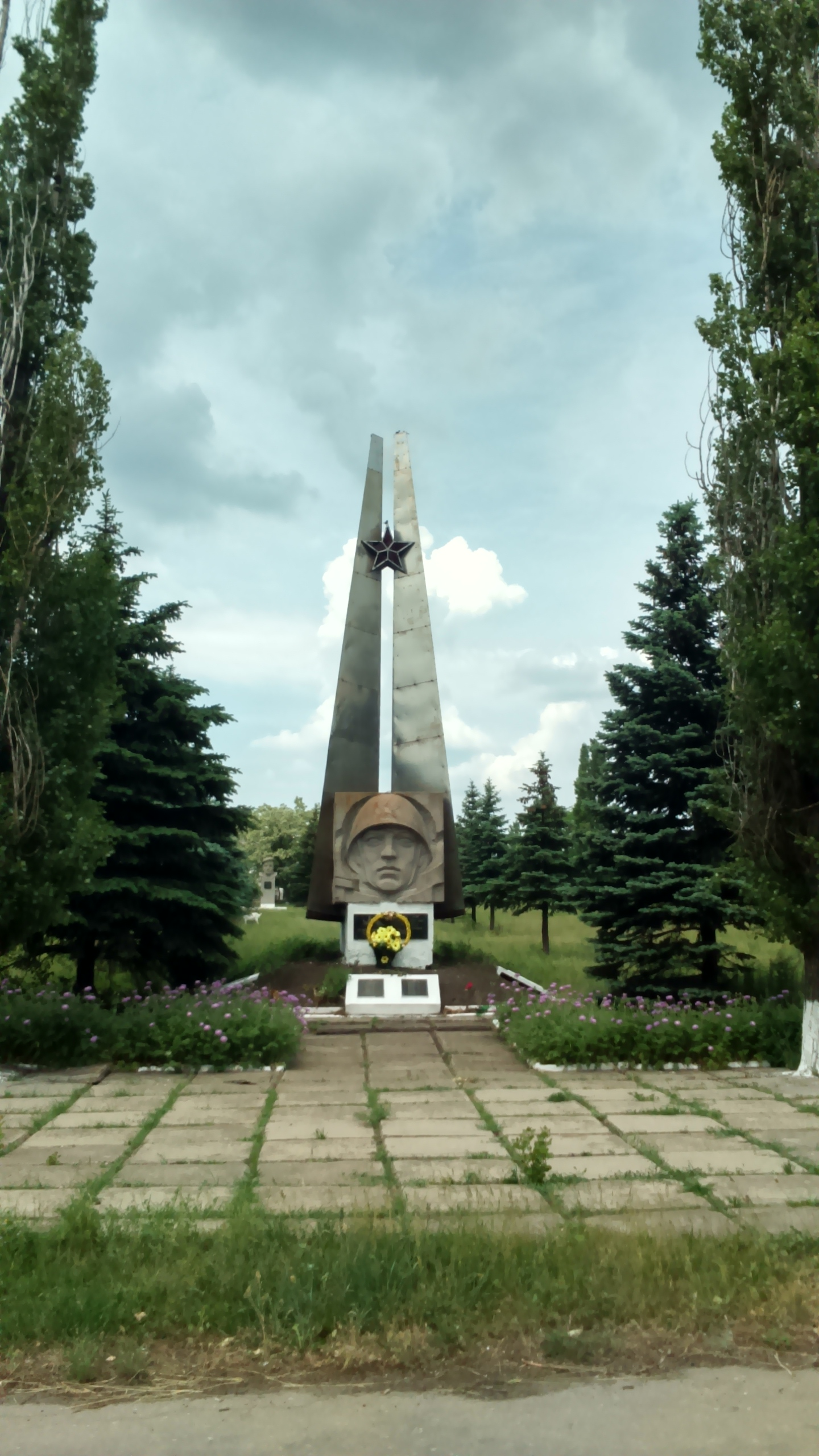 Пам'ятник солдатам ВВВ в селі Никанорівка Добропільський район.